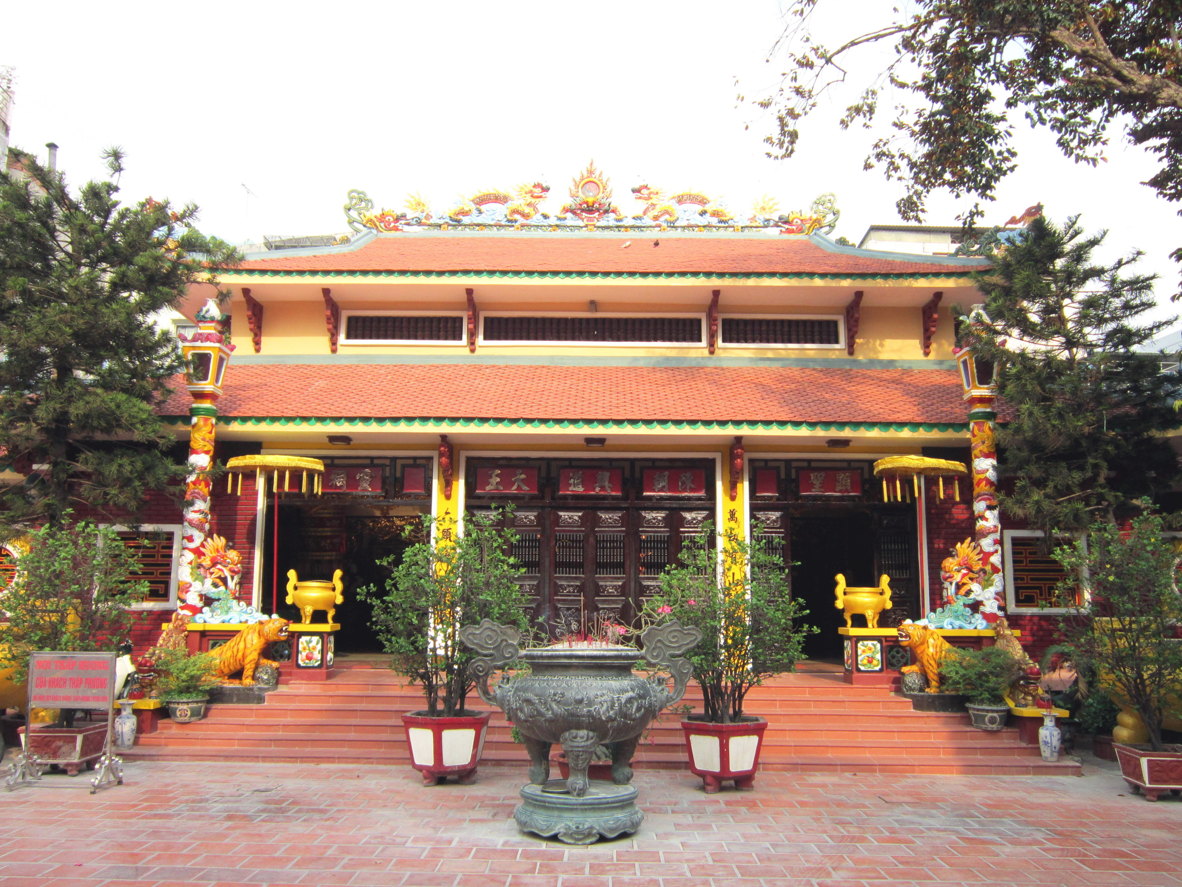 Đền thờ Trần Hưng Đạo ở số 36 đường Võ Thị Sáu, thuộc phường Tân Định, quận 1, Thành phố Hồ Chí Minh, Việt Nam.